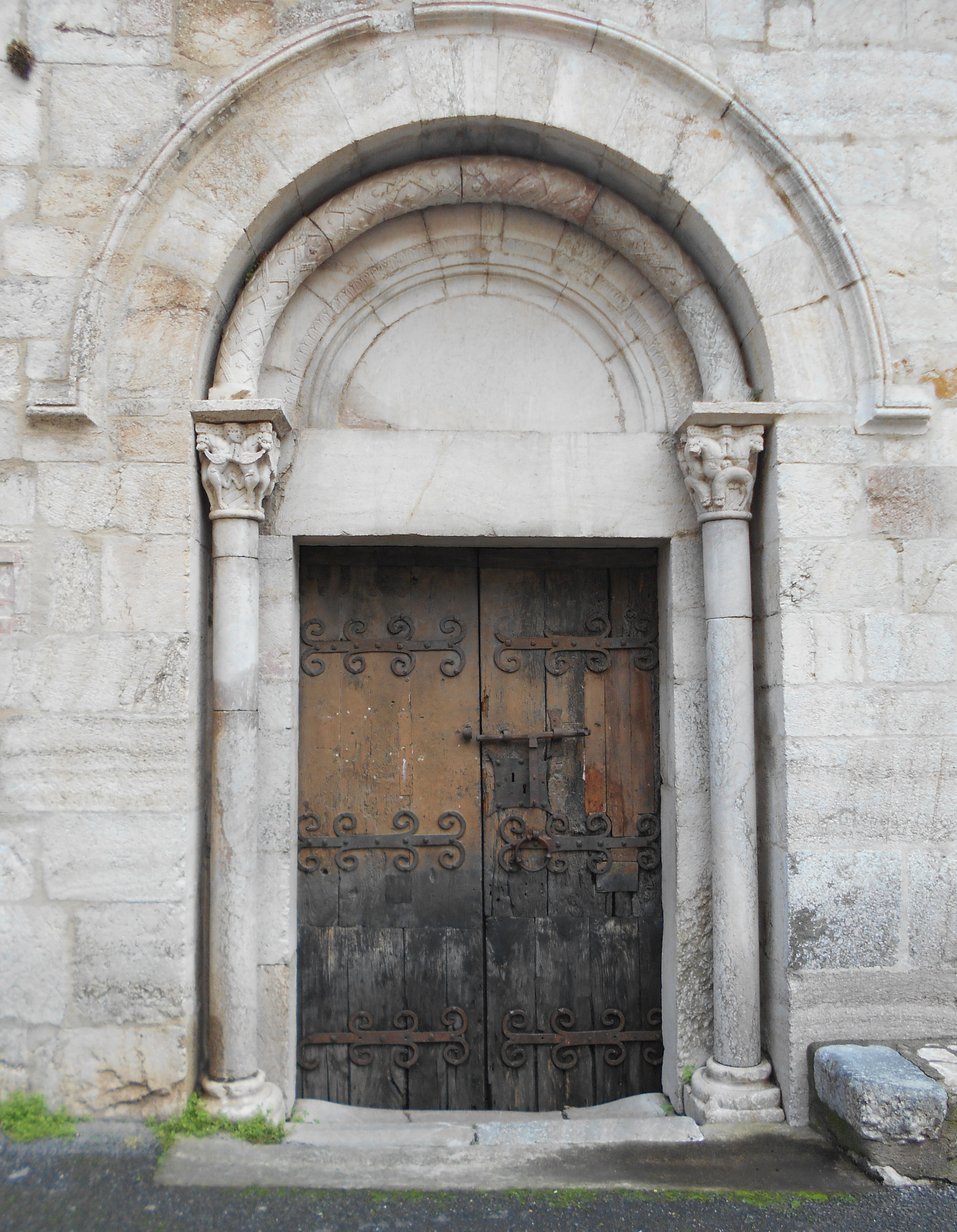 Portalada secundària de Sant Jaume de Vilafranca de Conflent